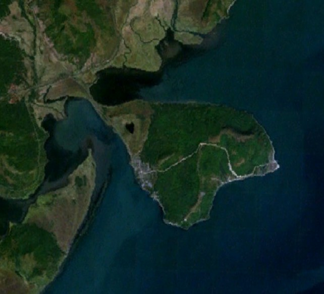 Песчаный полуостров